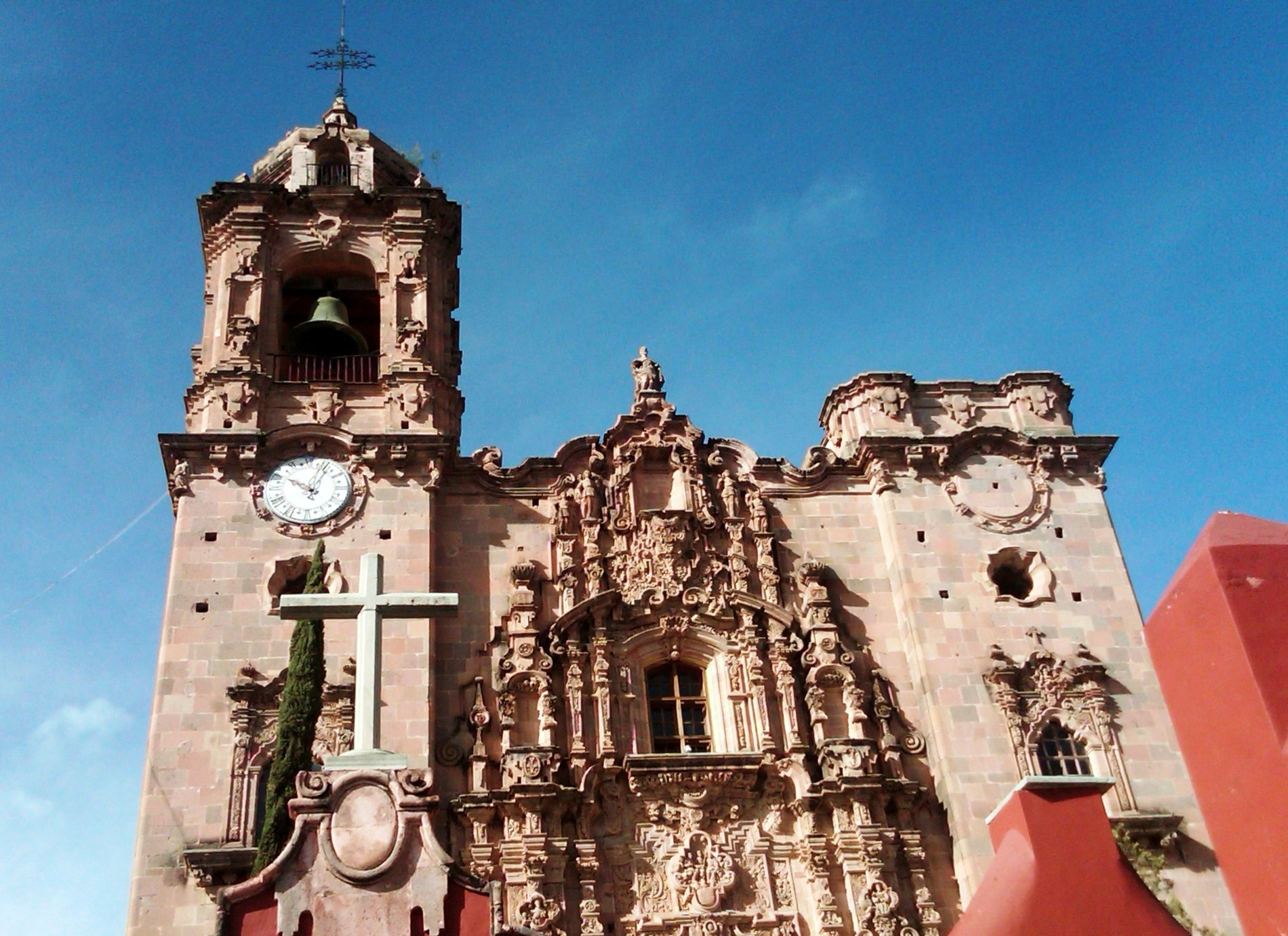 Iglesia de San Cayetano, Guanajuato, Mexico